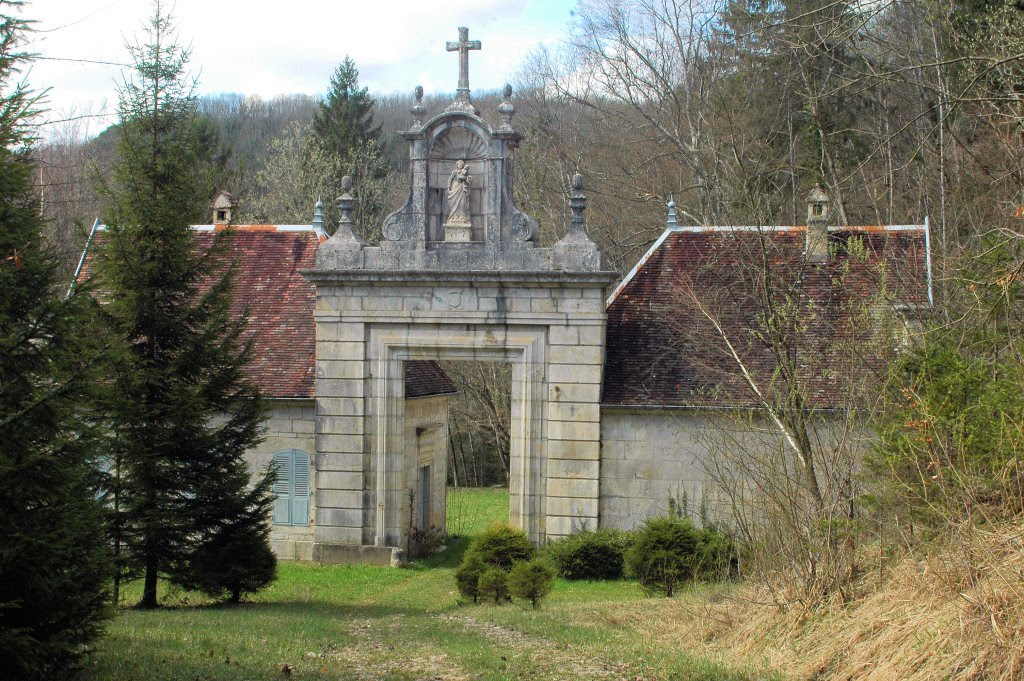 En 1968, pendant la création du barrage de Vouglans qui a noyé la Chartreuse, la porte et les pavillons d'entrée du monument ont soigneusement été démontés puis remontés au-dessus du niveau des eaux du lac